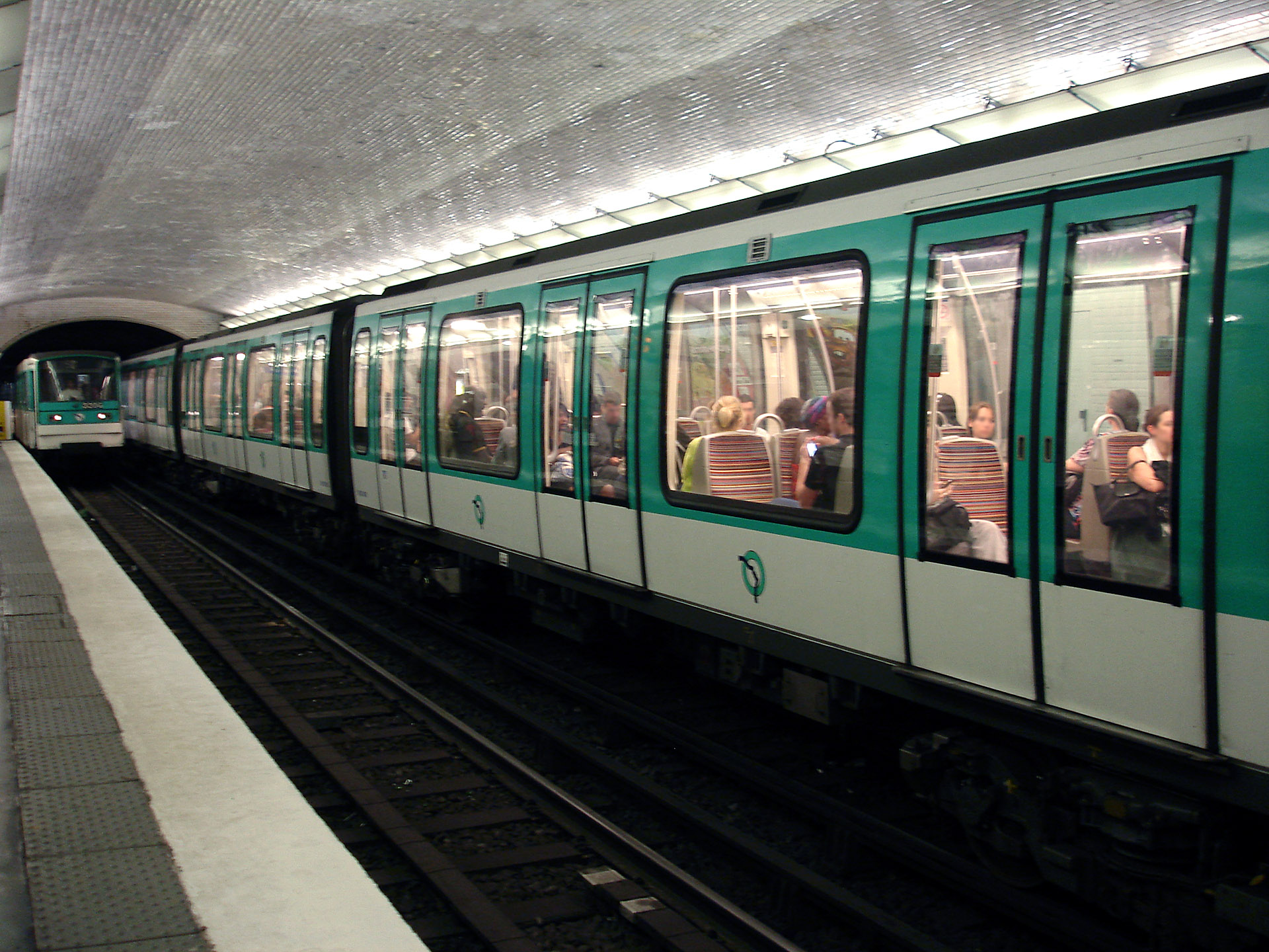 La station Alexandre Dumas de la ligne 2 du métro de Paris, France